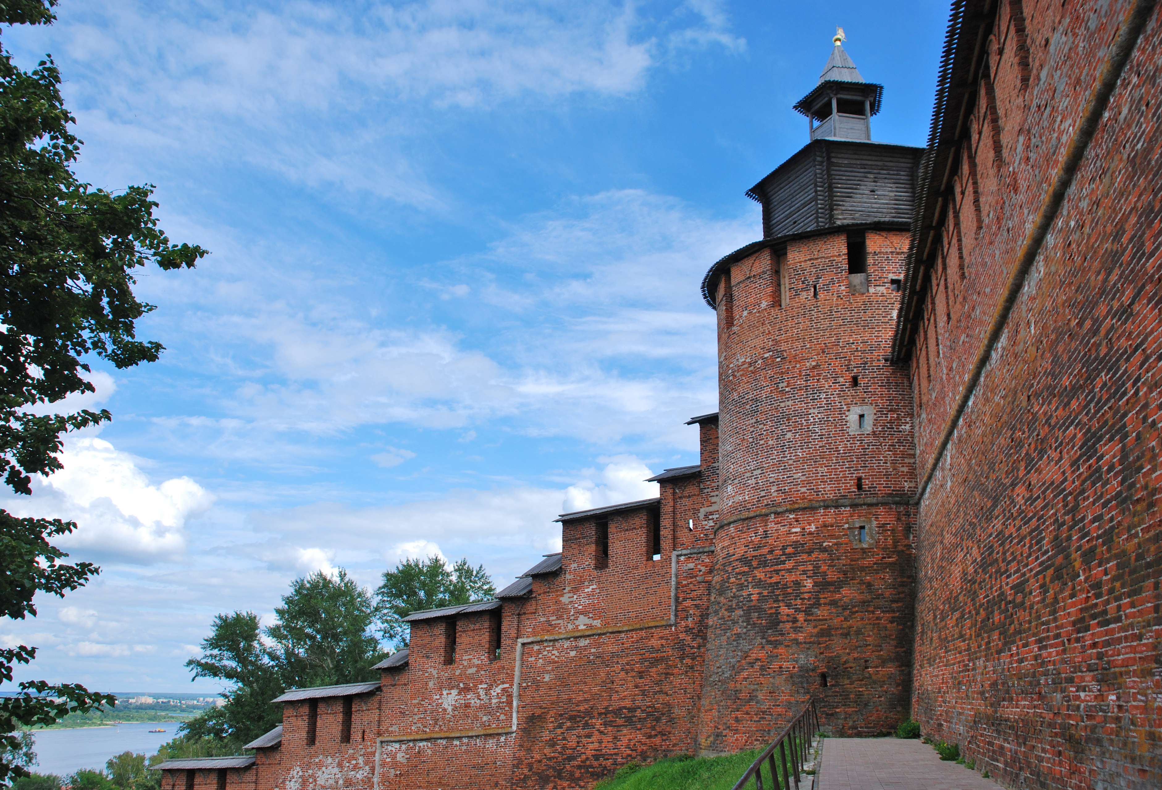 Башня Часовая (Нижегородская область, Нижний Новгород, Кремль, Минина и Пожарского площадь)